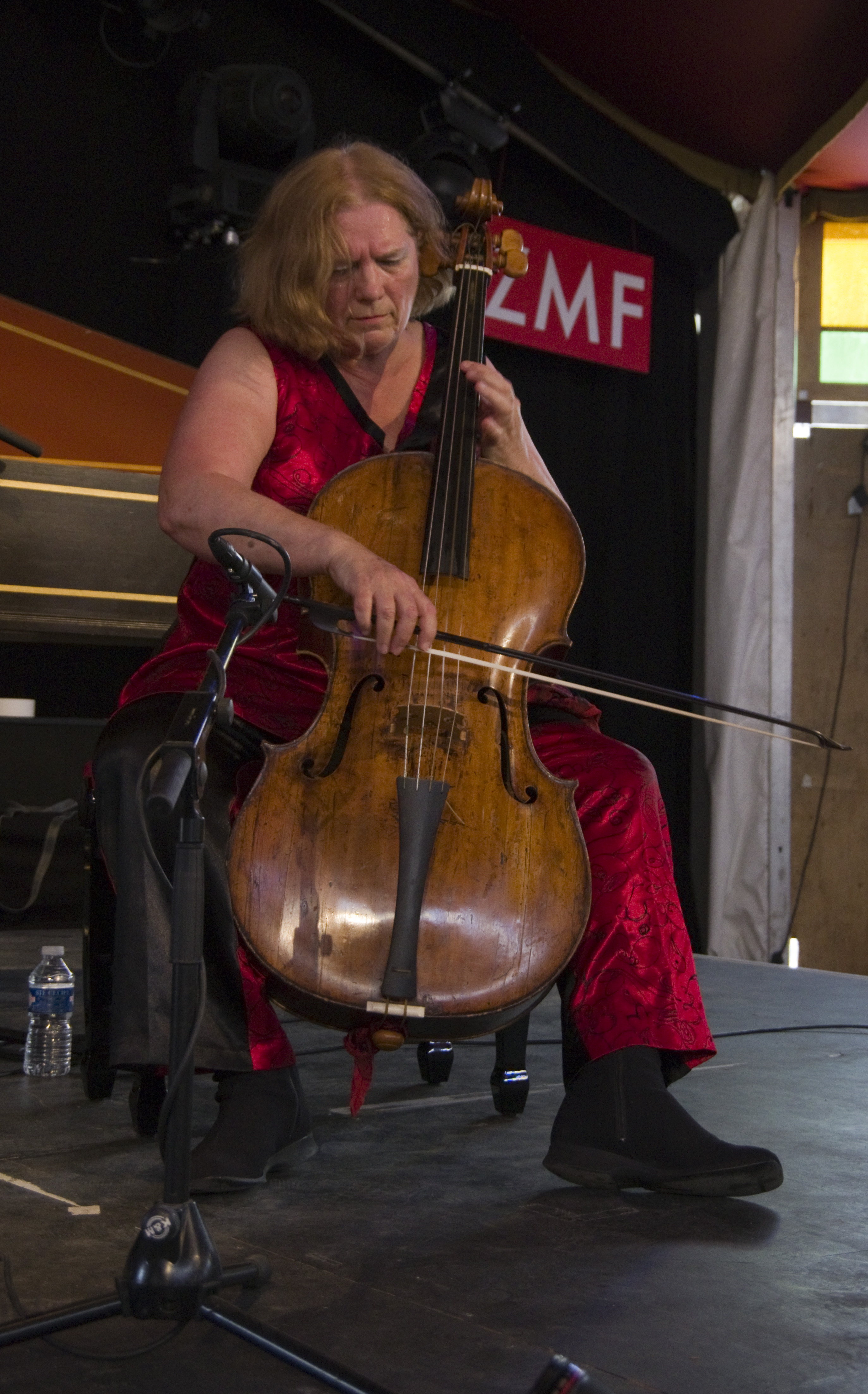 Das Zelt-Musik-Festival 2015 in Freiburg im Breisgau. 19.07.2015 Red Priest